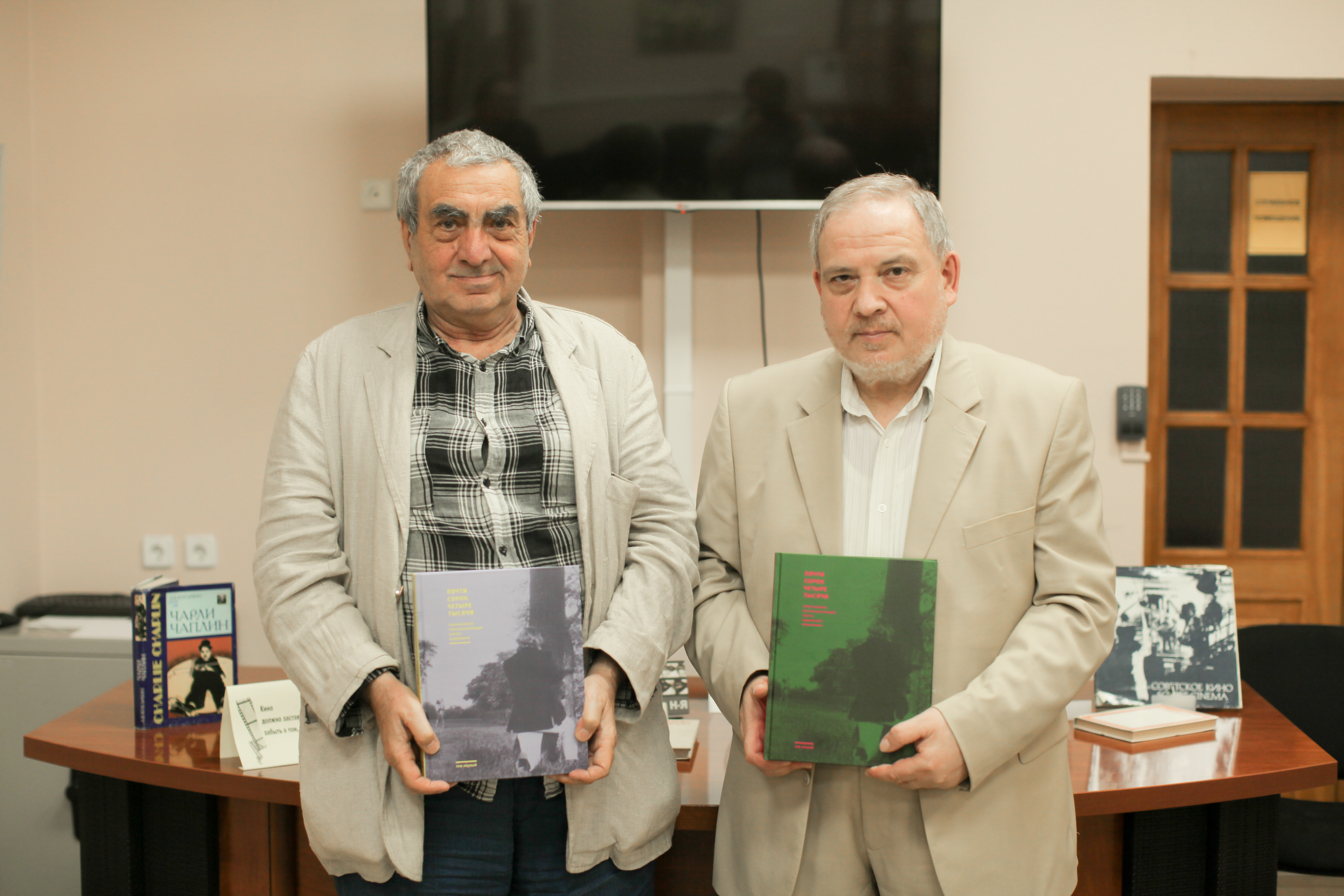 Организатор кинопроизводства и кинопроката Расим Даргях-заде и кинокритик Сергей Кудрявцев на презентации трёхтомника "Почти сорок четыре тысячи"